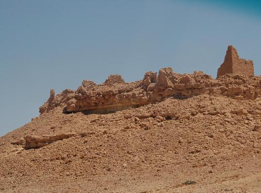 Gheriat el-Garbia, een Libische oase die vooral bekendheid geniet door de aanwezigheid van een Romeins fort.